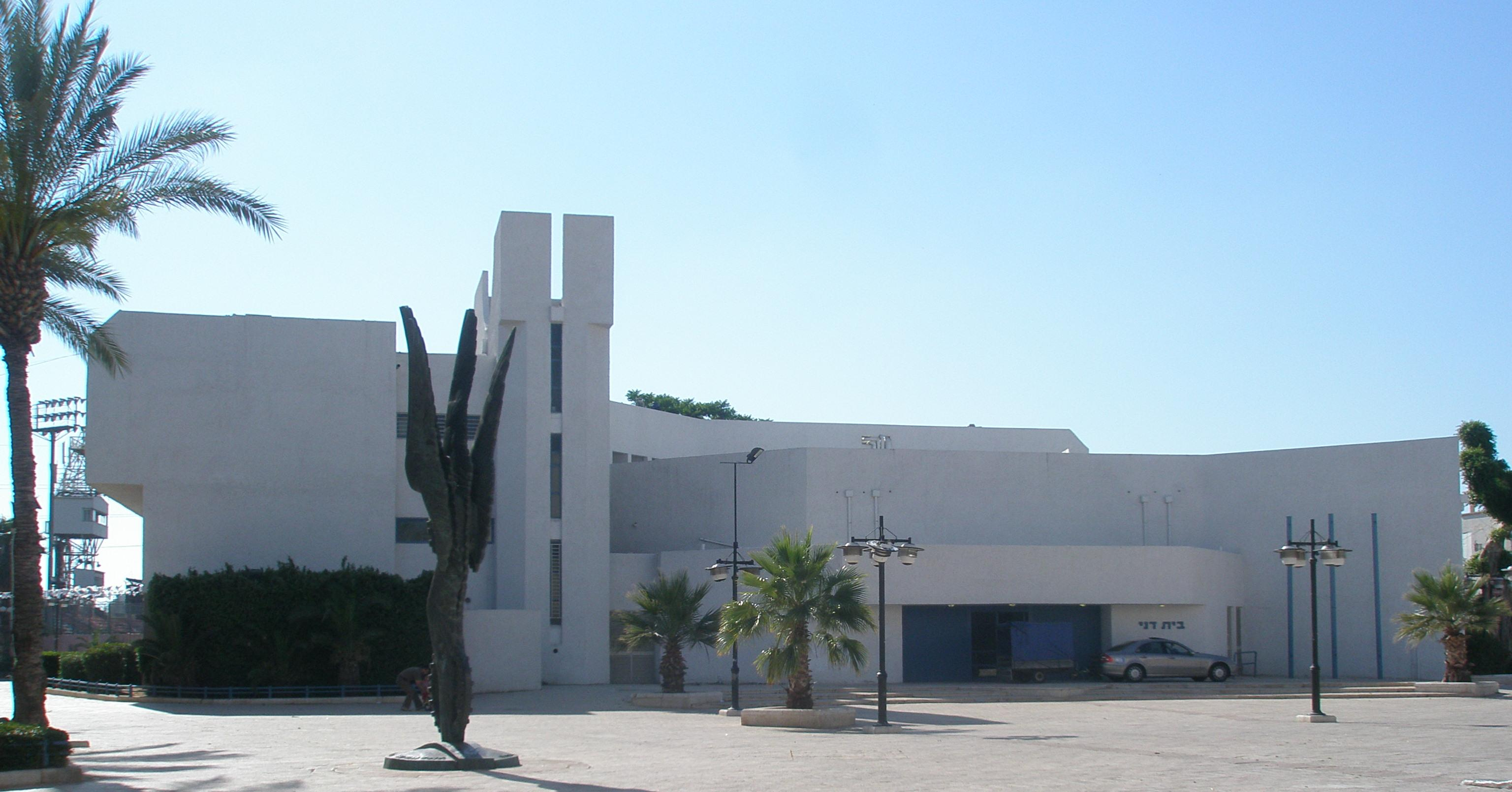 Beit Dani, Shchunat Hatikva, Tel Aviv